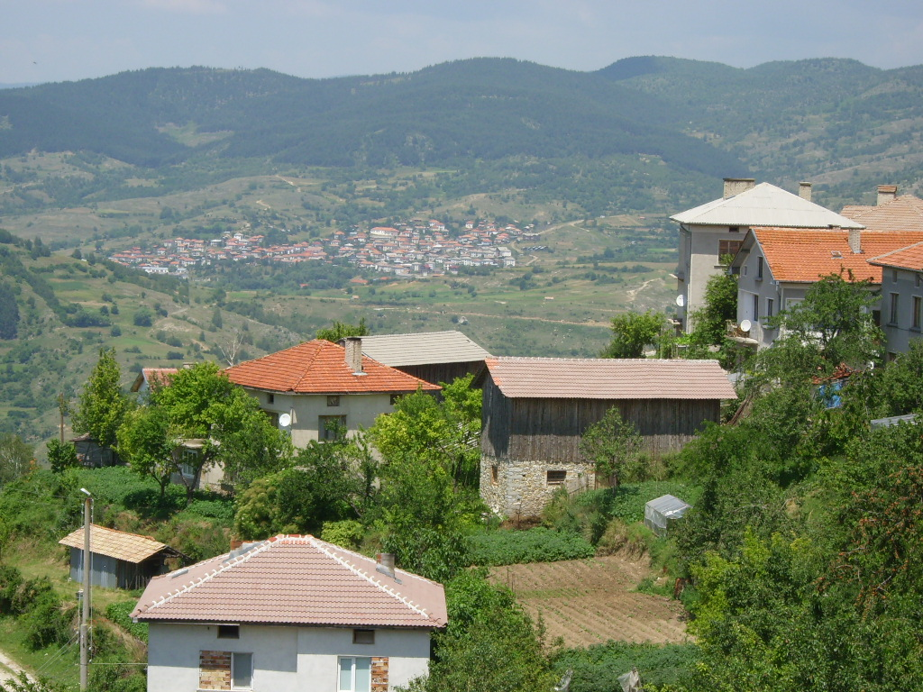 Село Црънча - изглед към село Ваклиново